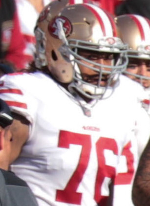 Pierre Garcon